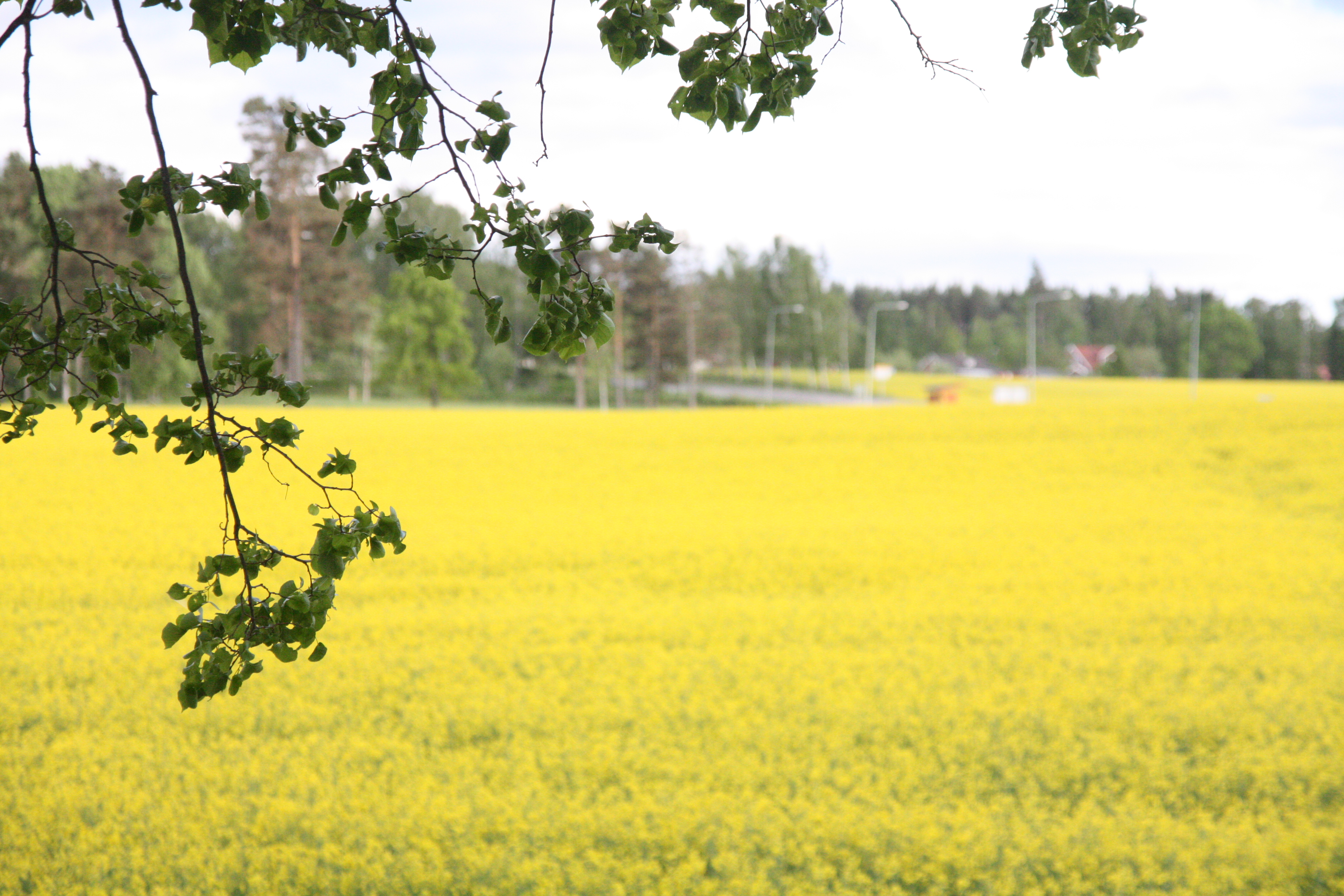 Vackra rapsfält i Tibro